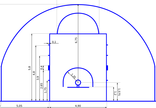 trumna